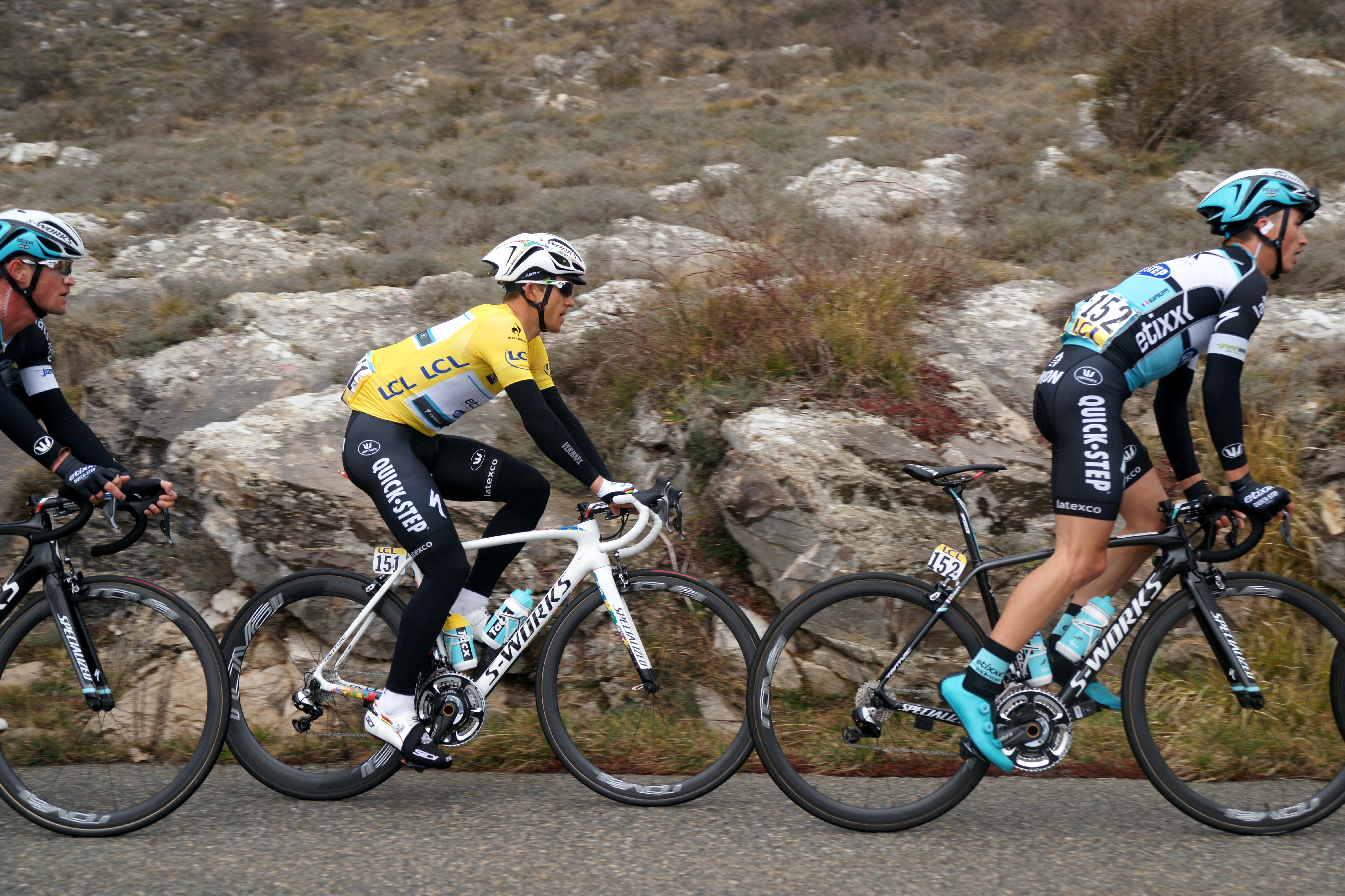 Michał Kwiatkowski pendant l'ascension du col de Vence, Paris-Nice 2015